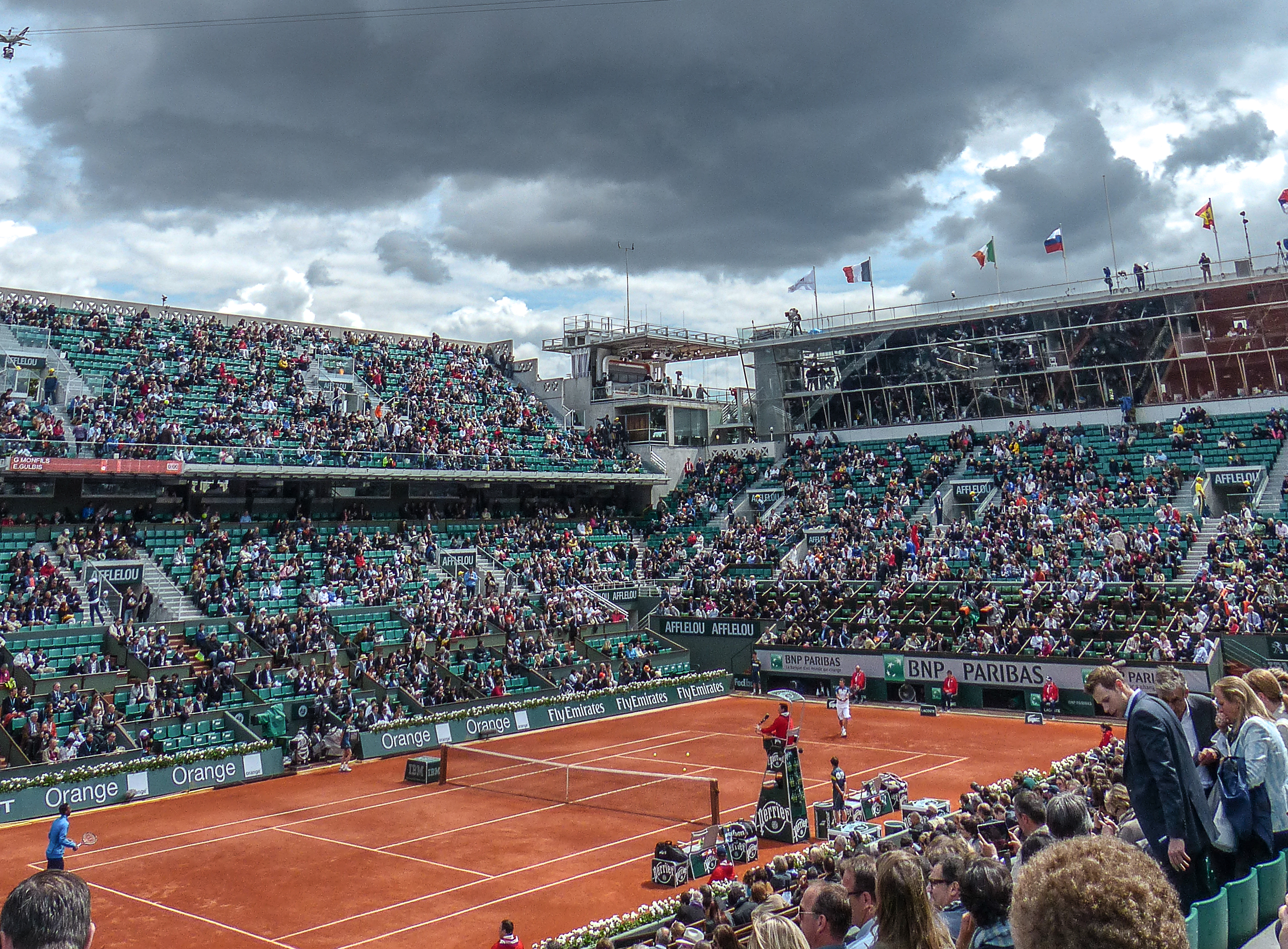 2ème tour Roland Garros 2013 : Gael Monfils (FRA) def. Ernests Gulbis (LAT). Risque de pluie.